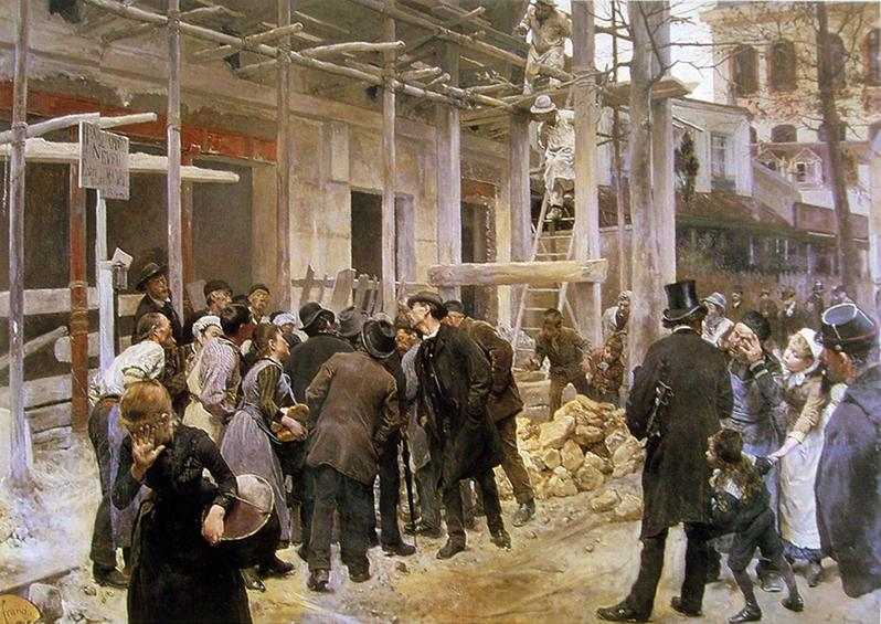 Una desgracia